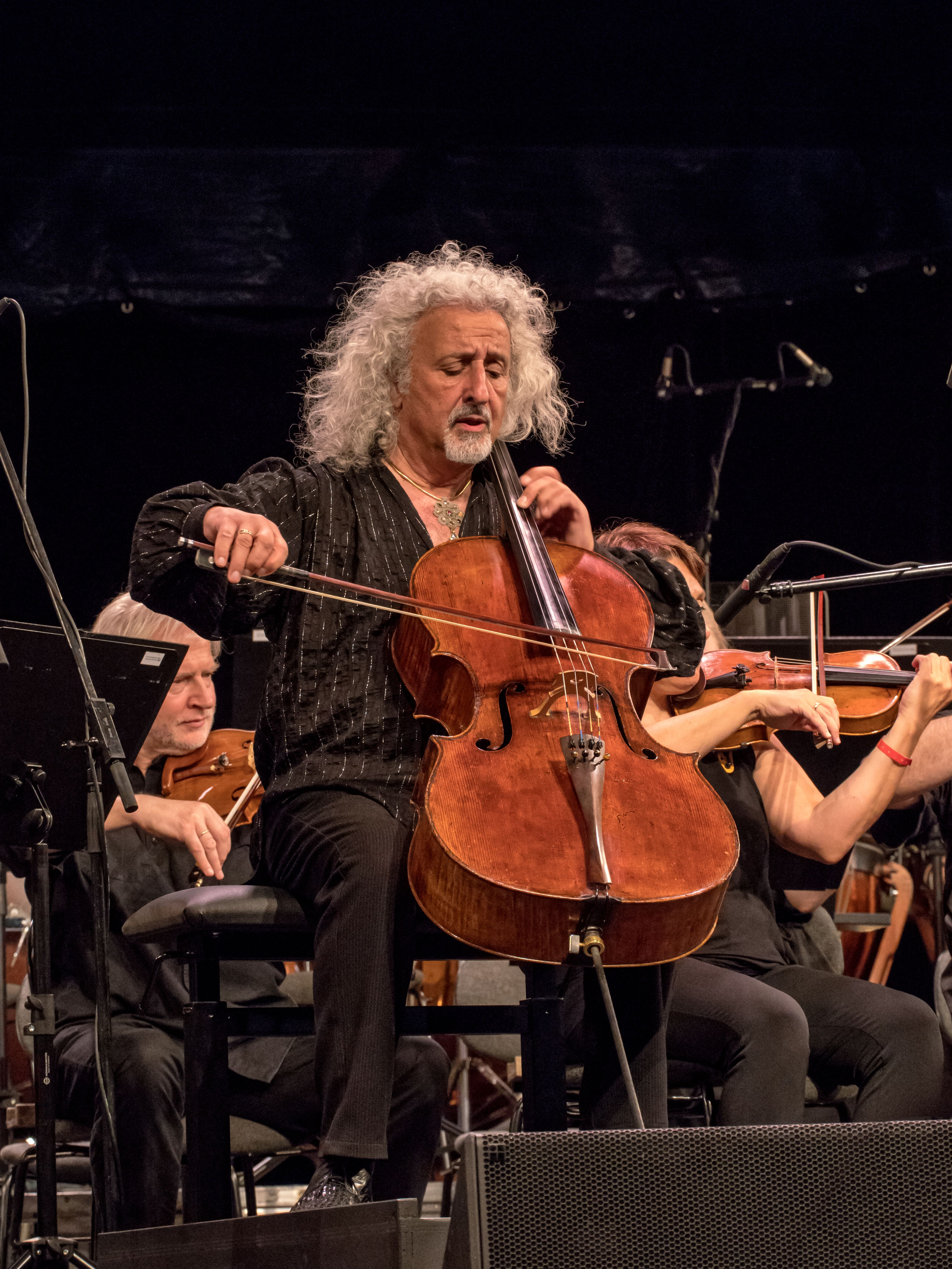 Bilder vom Zelt Musik Festival 2016 in Freiburg im Breisgau Die Gala